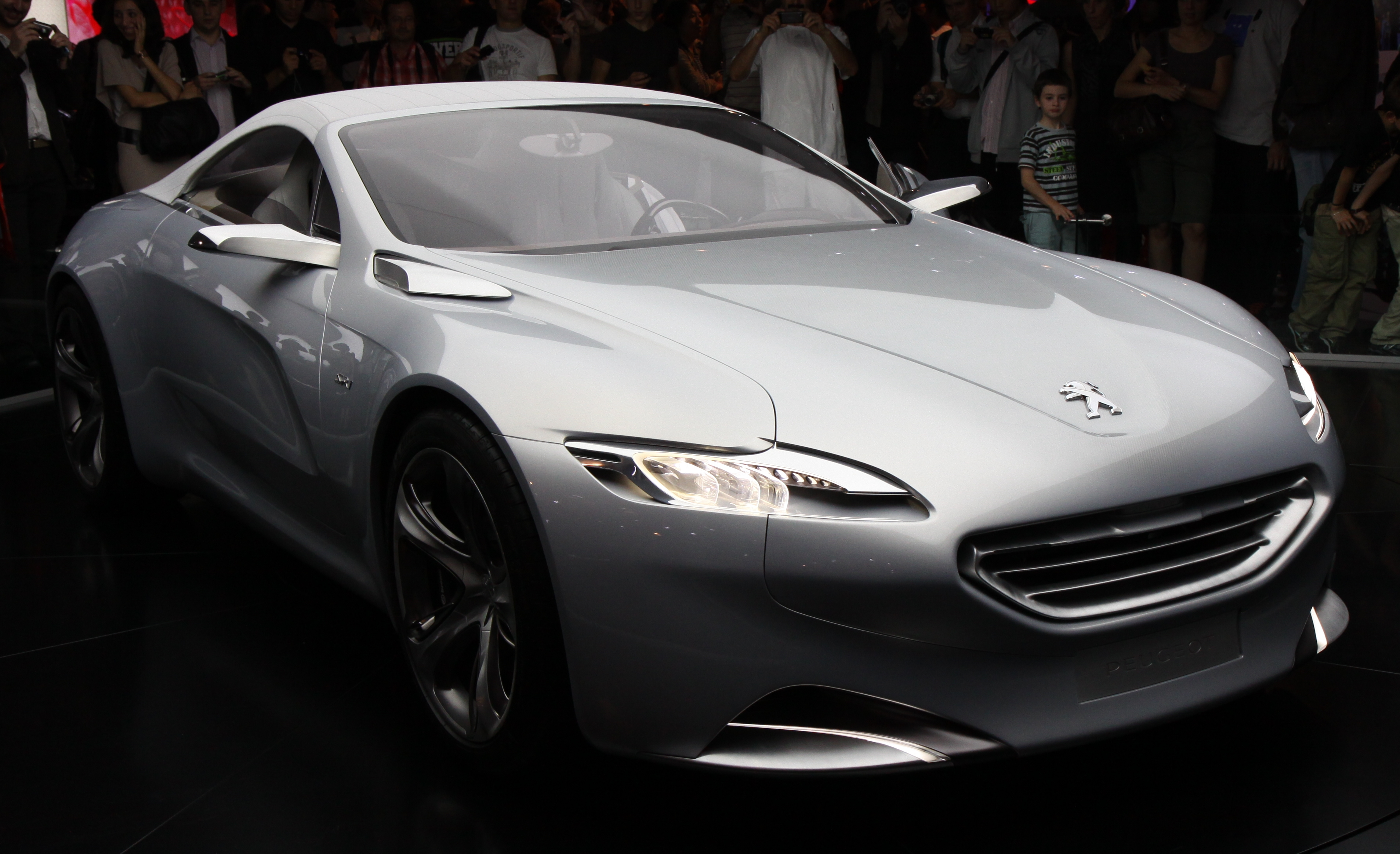 Paris - Mondial de l'automobile 2010